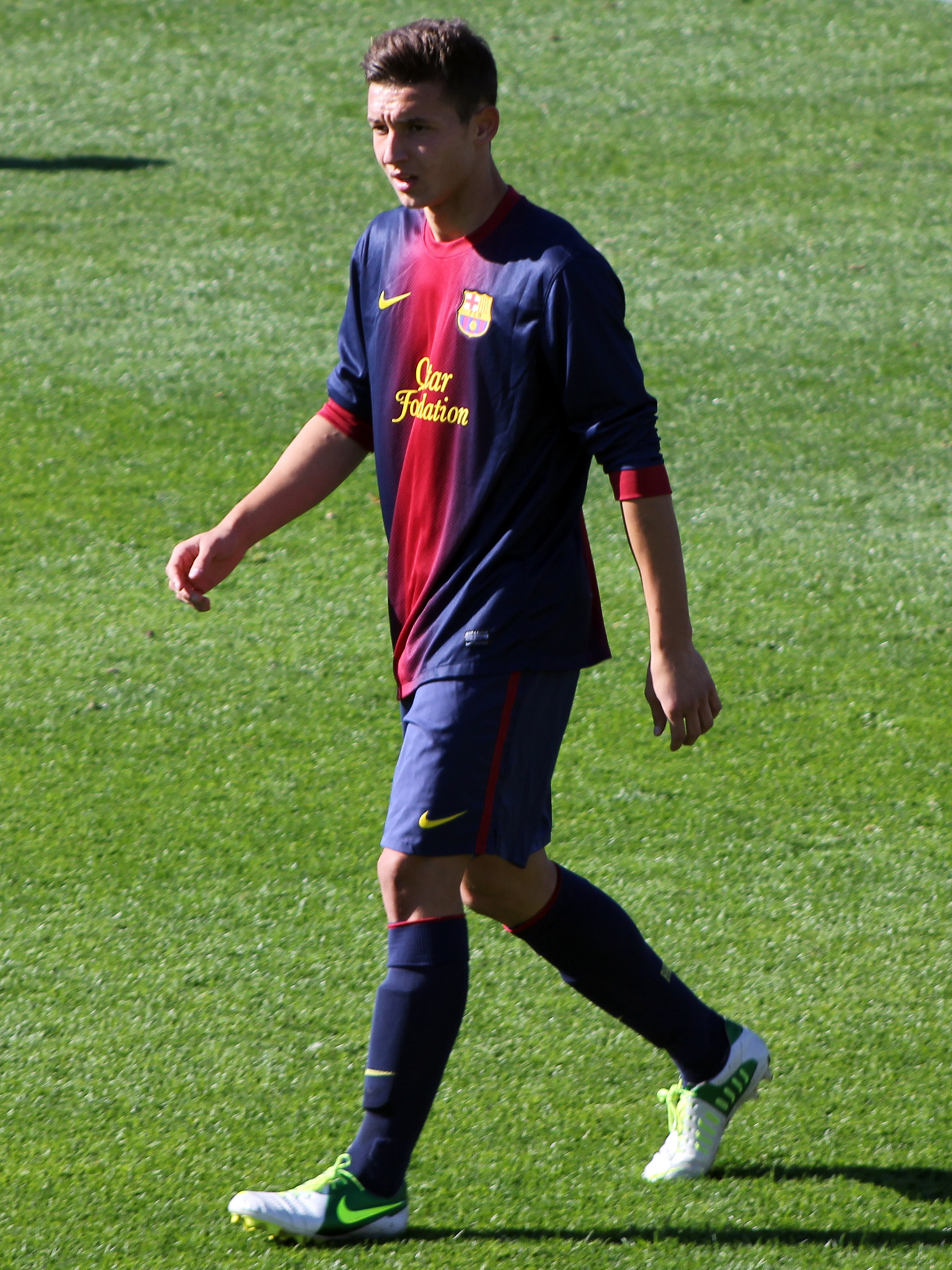 Foto realizada por Javier Segura (@castroquini)